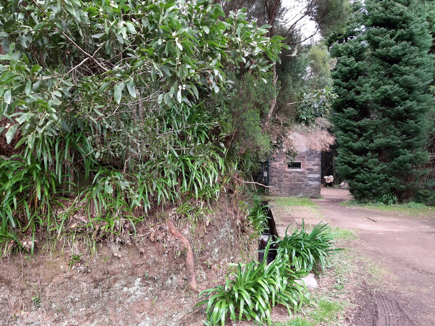 Casinha de divisão de água entre o concelho de Santa Cruz e o concelho de Machico